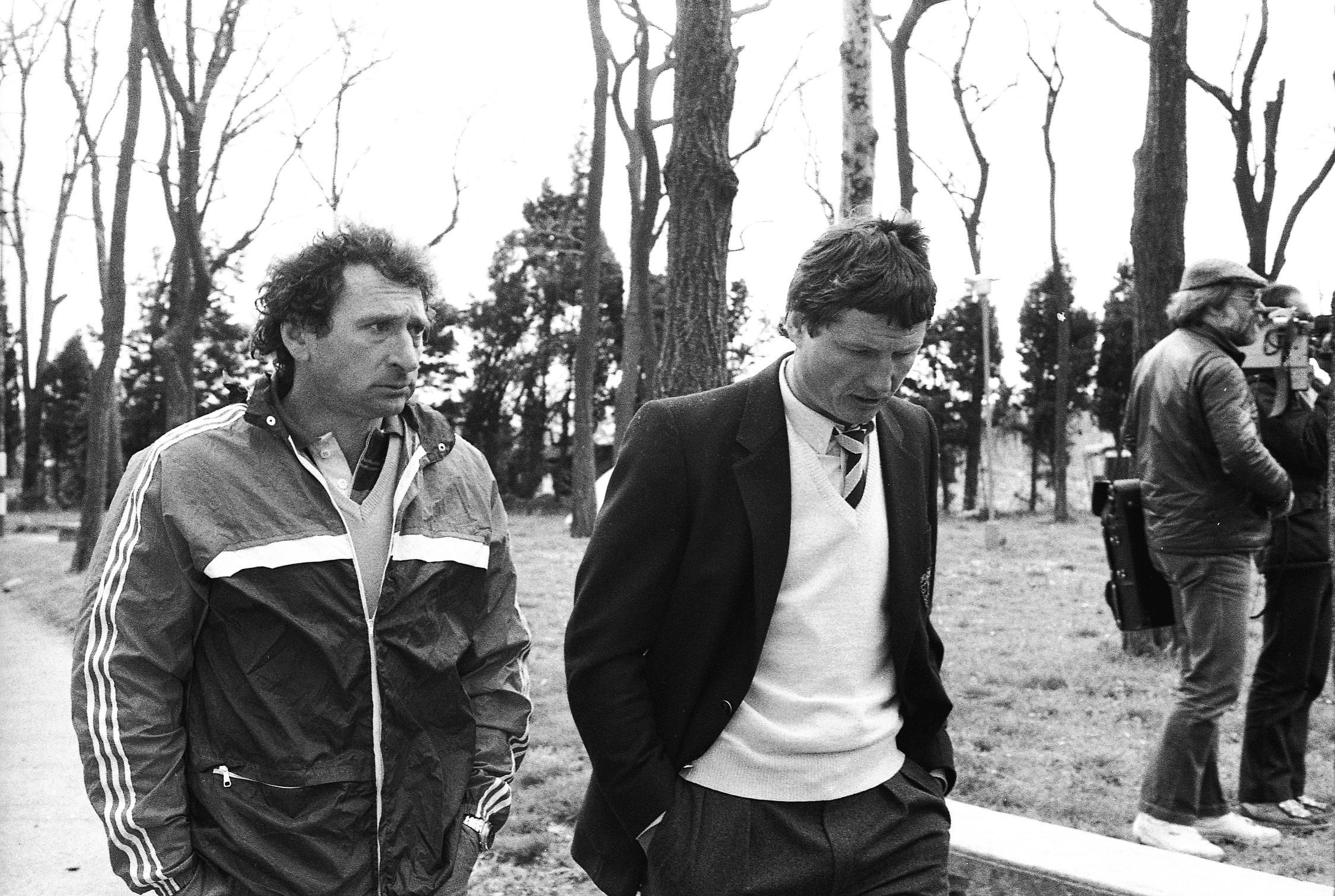 Pas de lieu. Le14 Avril 1985. Vue de Pierre Villepreux et de Jean-Claude Skrela entraineurs du Stade Toulousain en civil dans un sous-bois.